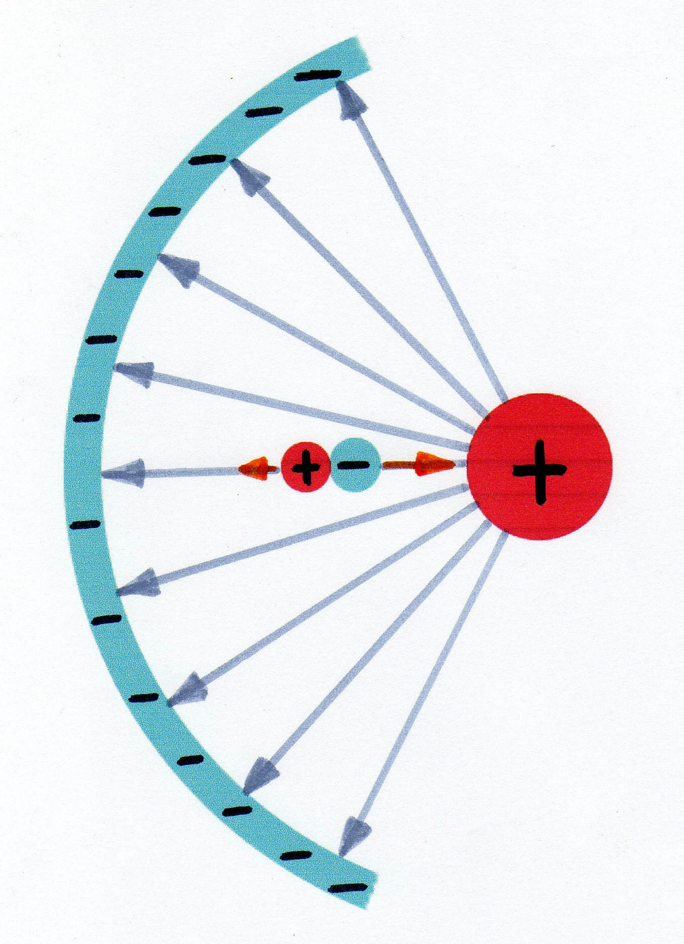 Dipol im inhomogenen elektrischen Feld